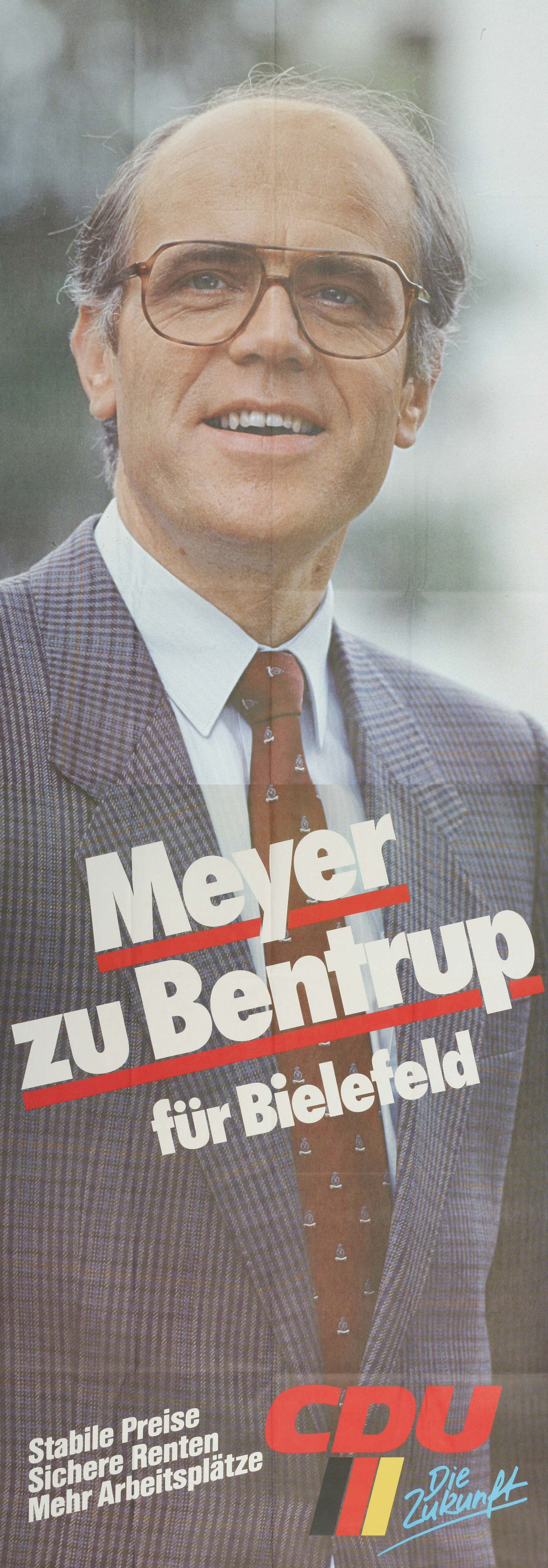 Meyer zu Bentrup für Bielefeld Stabile Preise Sichere Renten Mehr Arbeitsplätze CDU Die Zukunft Abbildung: Porträtfoto Plakatart: Kandidaten-/Personenplakat mit Porträt Objekt-Signatur: 10-001: 2944/1/2 Bestand: Plakate zu Bundestagswahlen (10-001) GliederungBestand10-18: Plakate zu Bundestagswahlen (10-001) » Die 11. Bundestagswahl am 25. Januar 1987 » CDU » Mit Porträtfoto Lizenz: KAS/ACDP 10-001: 2944/1/2 CC-BY-SA 3.0 DE